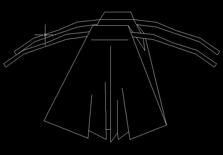 袴（和服）實為漢服绔的演變，兩寬褲腿，加褶。外形似下裳